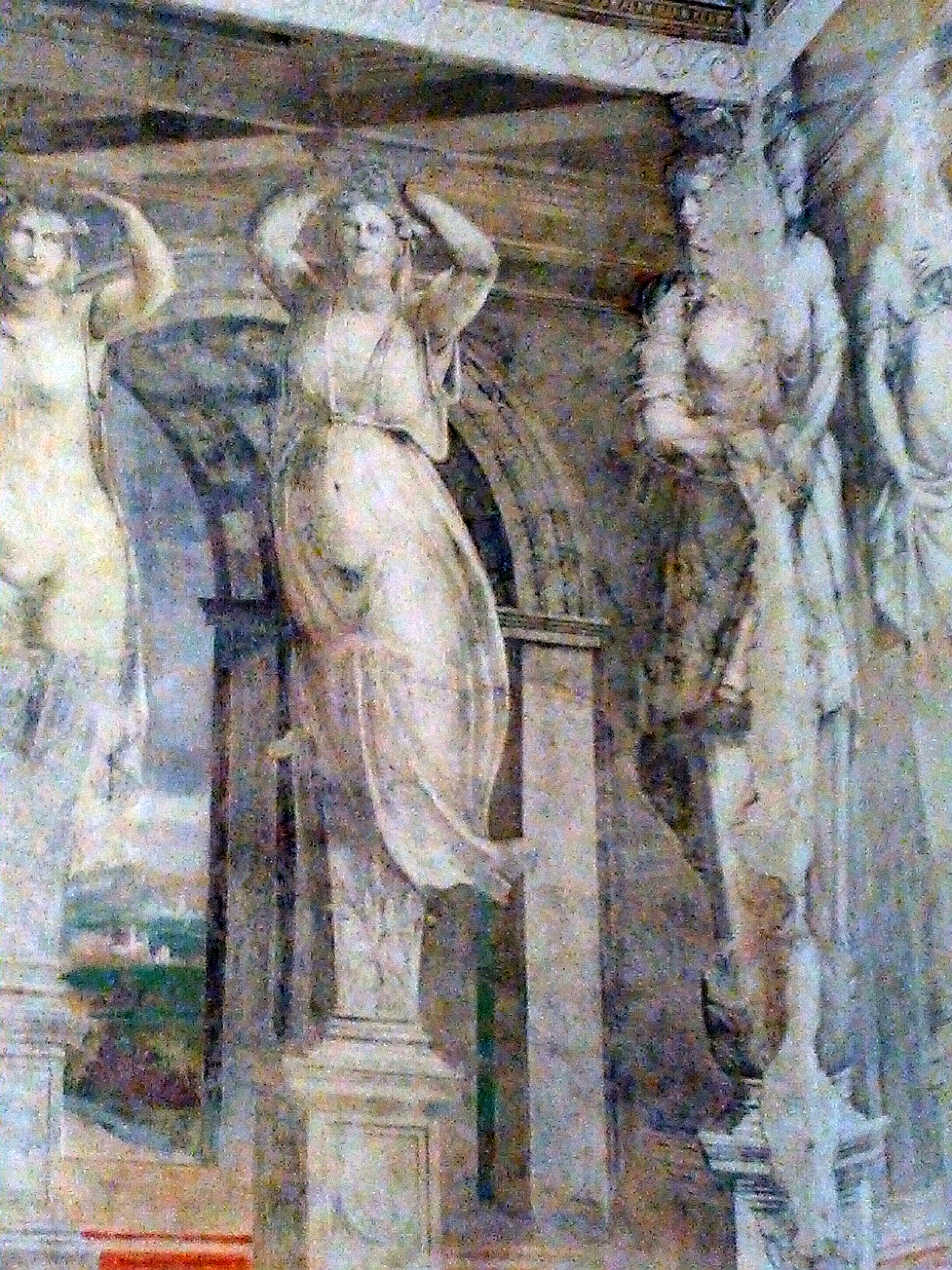 Castello Estense di Belriguardo This is a photo of a monument which is part of cultural heritage of Italy.